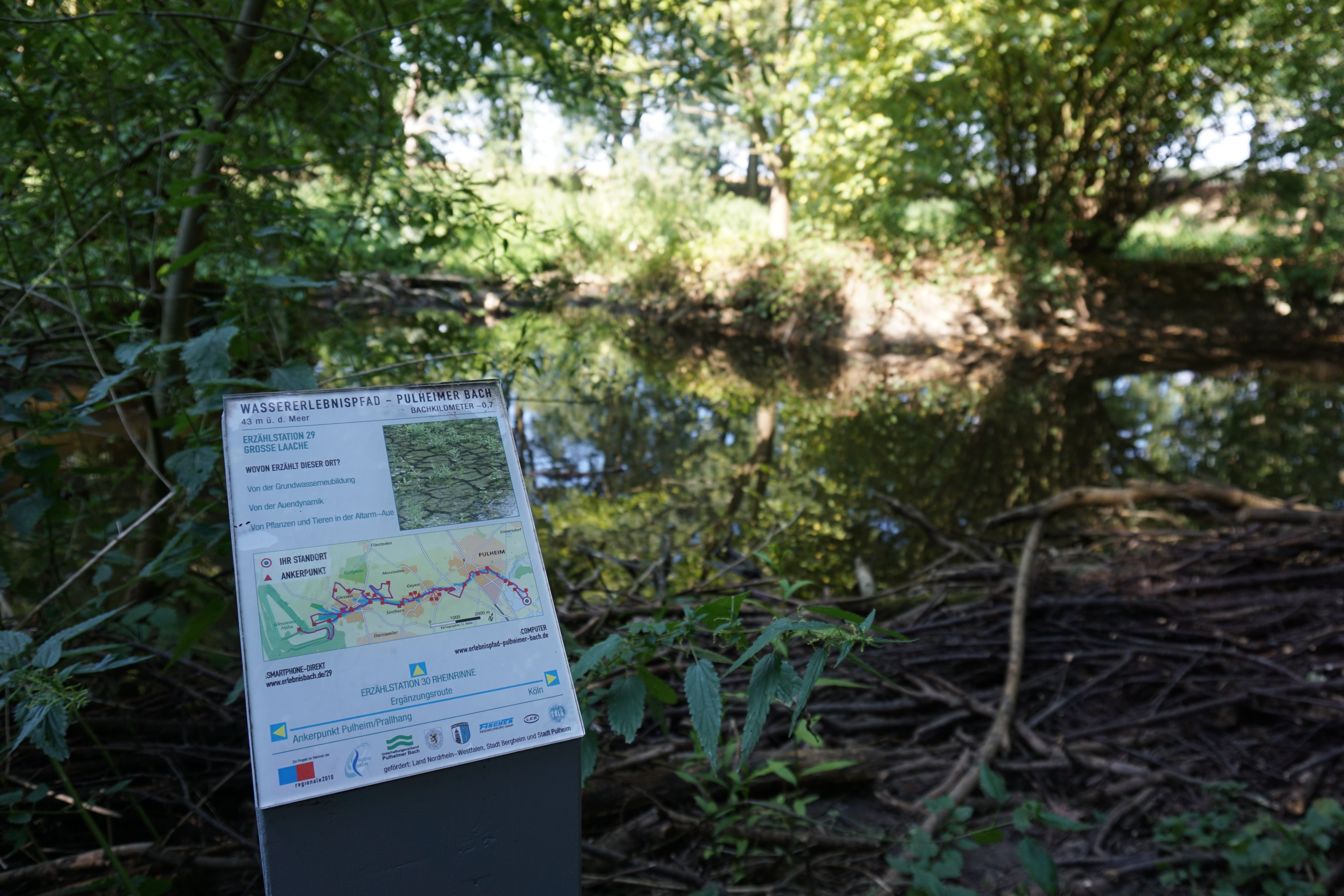 Erzählstation 29 „Große Laache“ des Wassererlebnispfads Pulheimer Bach